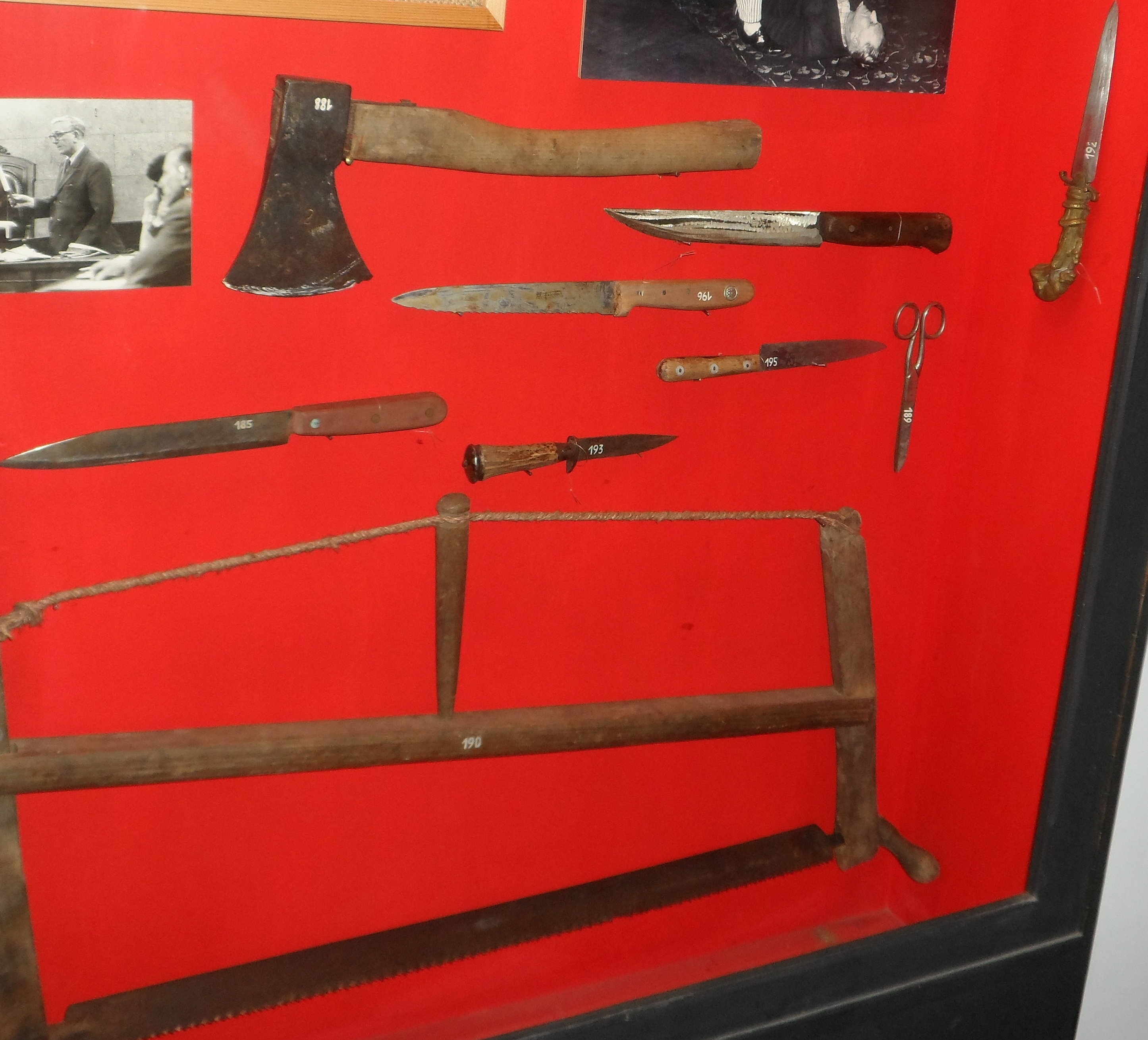 Tatwerkzeuge des Mordfalls Johann Rogatsch aus Wien von 1960